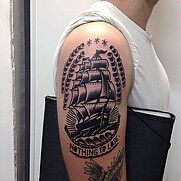 Tatoo